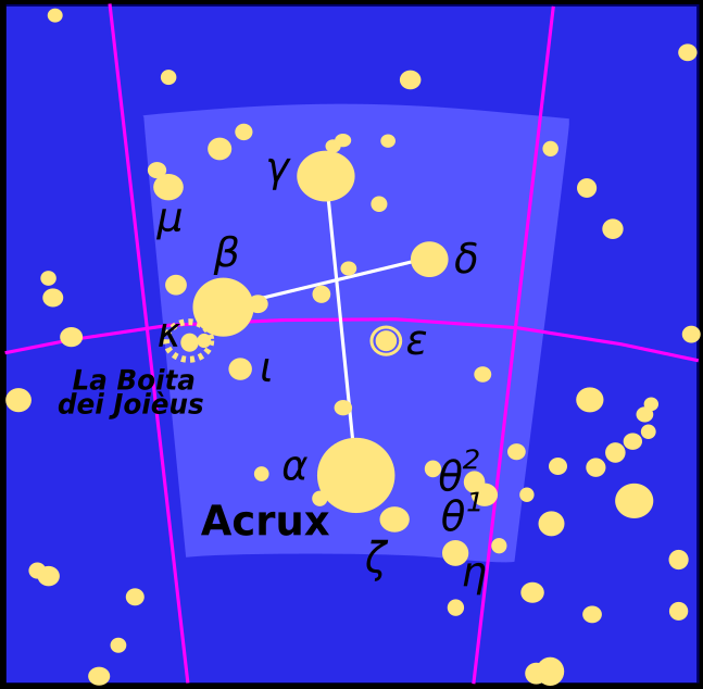 Constellacion de la Crotz dau Sud.